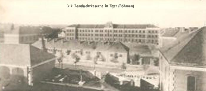 Landwehrkaserne k.k. Lw InfRgt 6